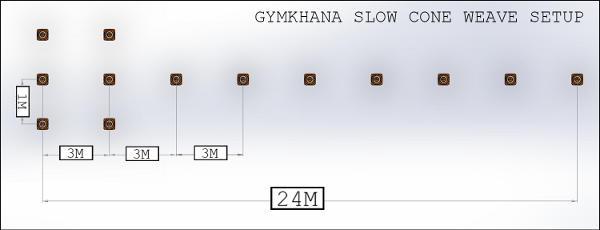 slalom figuur